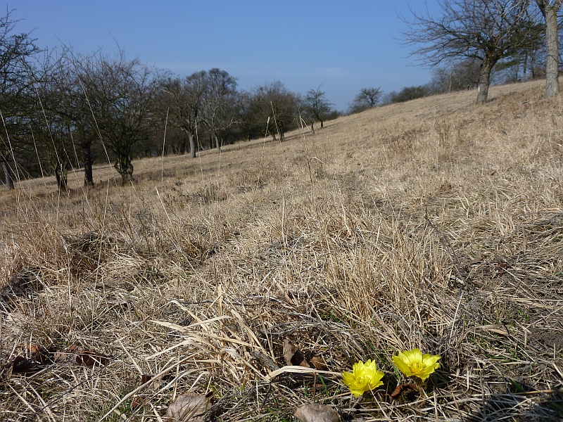 NPR Kněžičky, první exemplář hlaváčku jarního na stráni Žehuňské obory. Datum pořízení je 16. března 2012.